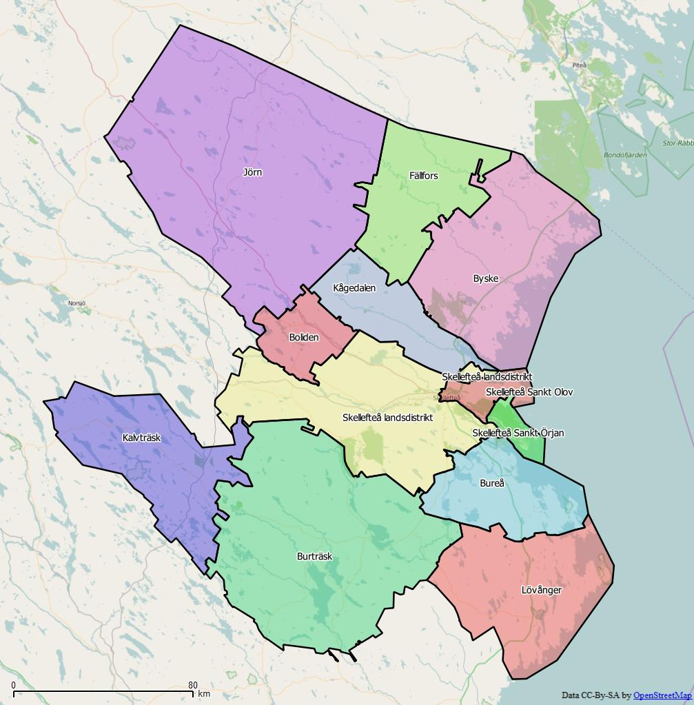 Distriktsindelningen i Skellefteå kommun World file: 306.77841854260782384 0 0 -306.77841854260782384 2134667.5541815385222435 9720407.64102084562182426